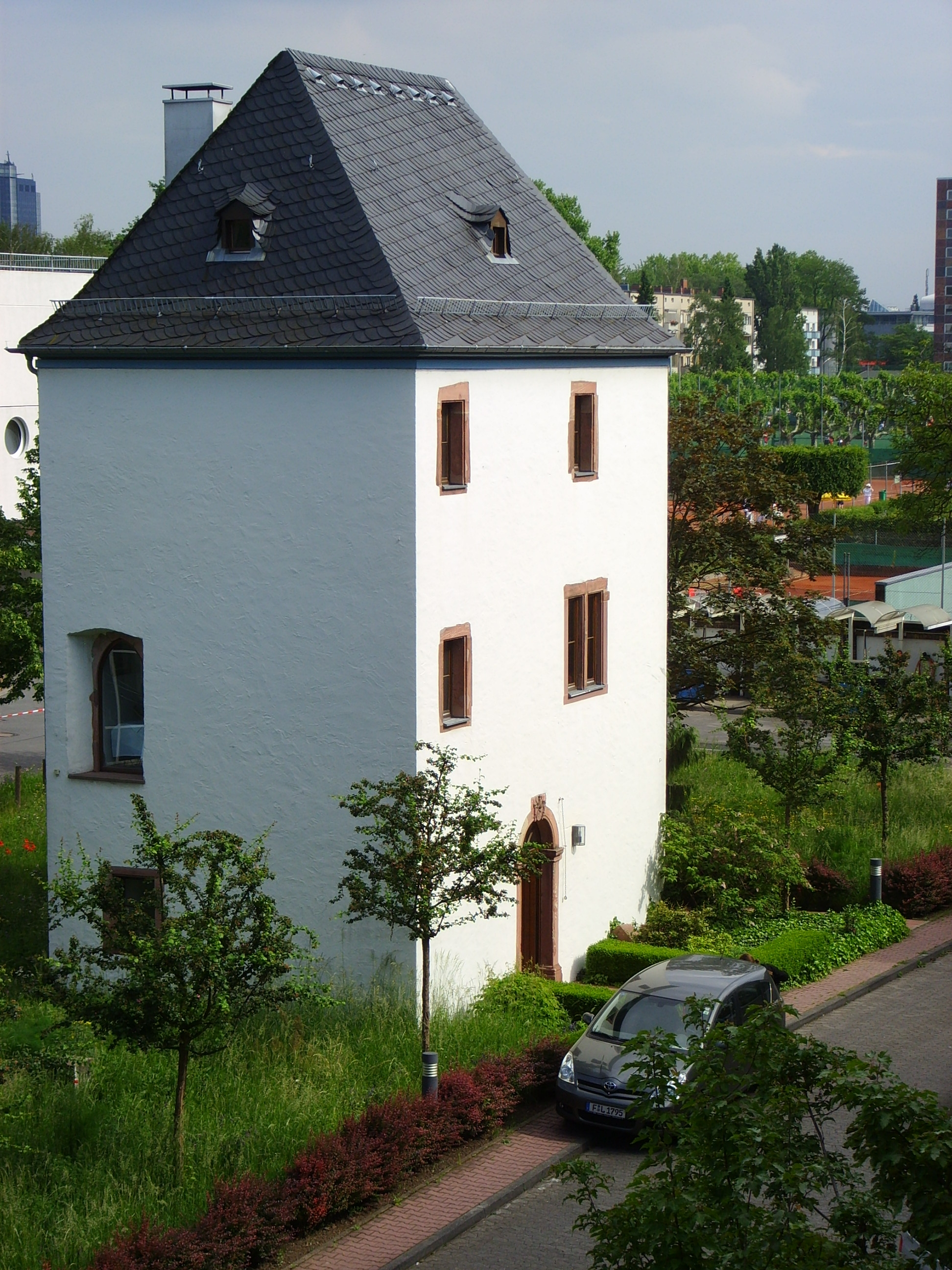 Kühhornshofturm, Frankfurt am Main, erbaut: vermutlich 16. Jahrhundert